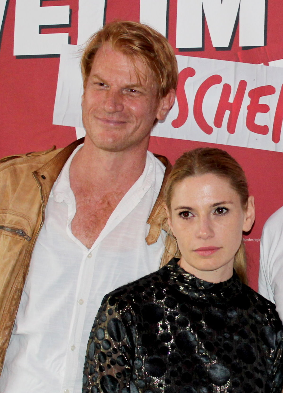 40211 Düsseldorf, Klosterstraße 78. Bambi Filmstudio. Am Dienstag, den 29.5.2018 wurde im Filmkunstkino Bambi in Düsseldorf die NRW-Premiere des neuen Films von der Regisseurin Laura Lackmann "ZWEI IM FALSCHEN FILM" gefeiert. Aufnahme von 2018.